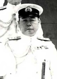 柳沢蔵之助海軍少将